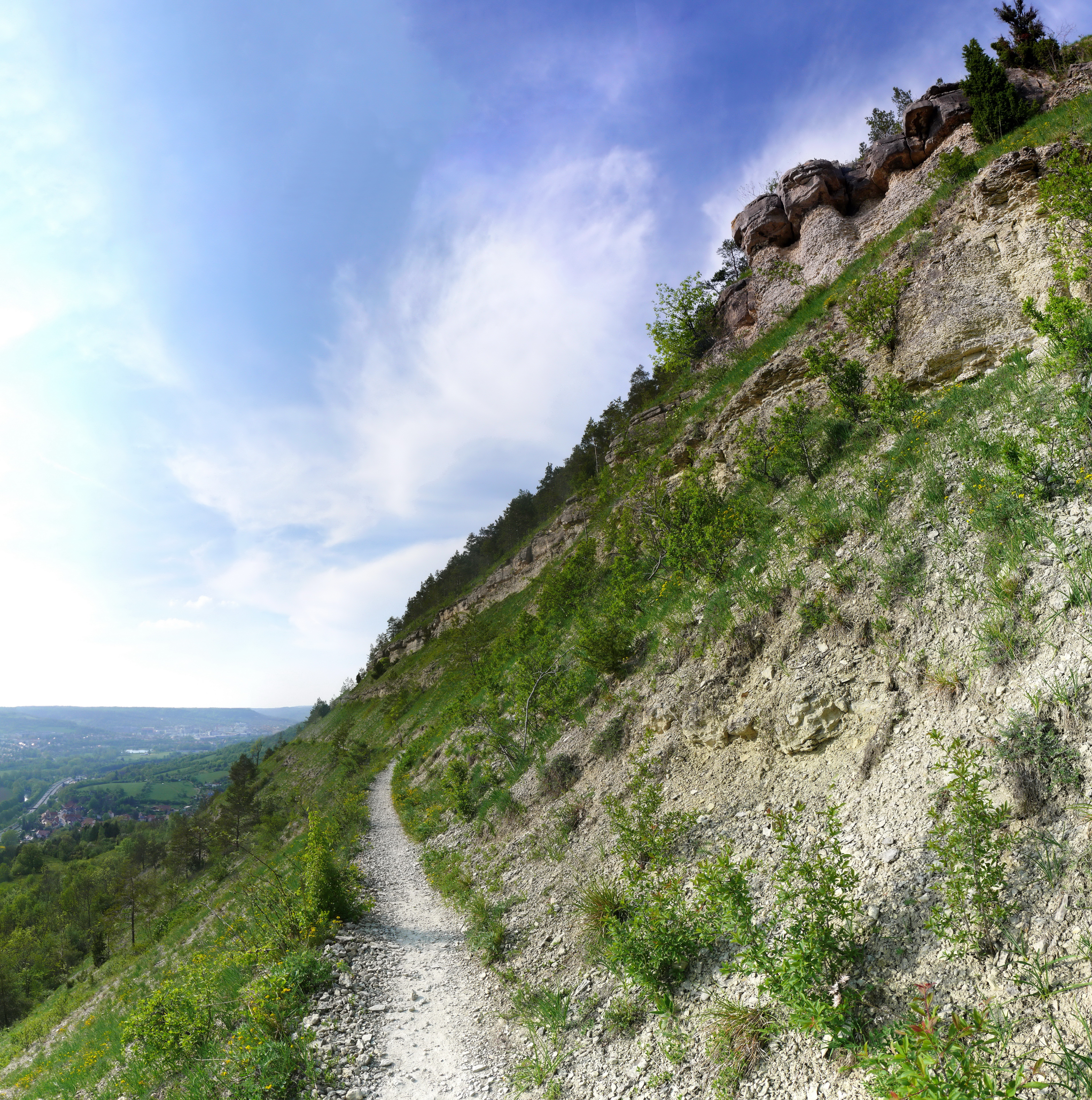 Zu sehen ist ein Wanderweg an der Johannesberg-Horzontale mit Blick gen Norden-Westen. Links im Bild sind Winzerla und Lichtenhain bei Jena zu sehen. Das Foto ist im Naturschutzgebiet "Kernberge und Wöllmisse" bei Jena entstanden.